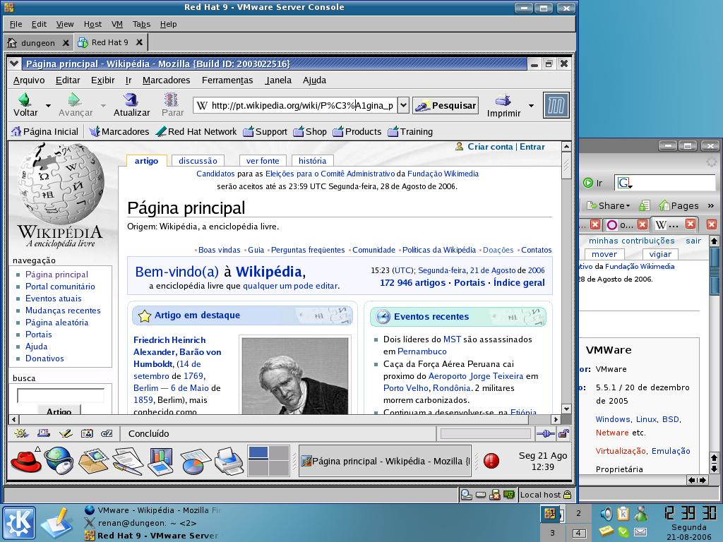 Red Hat 9 executado sob o VMware Server. O sistema hospedeiro (host) é o ubuntu 6.06.